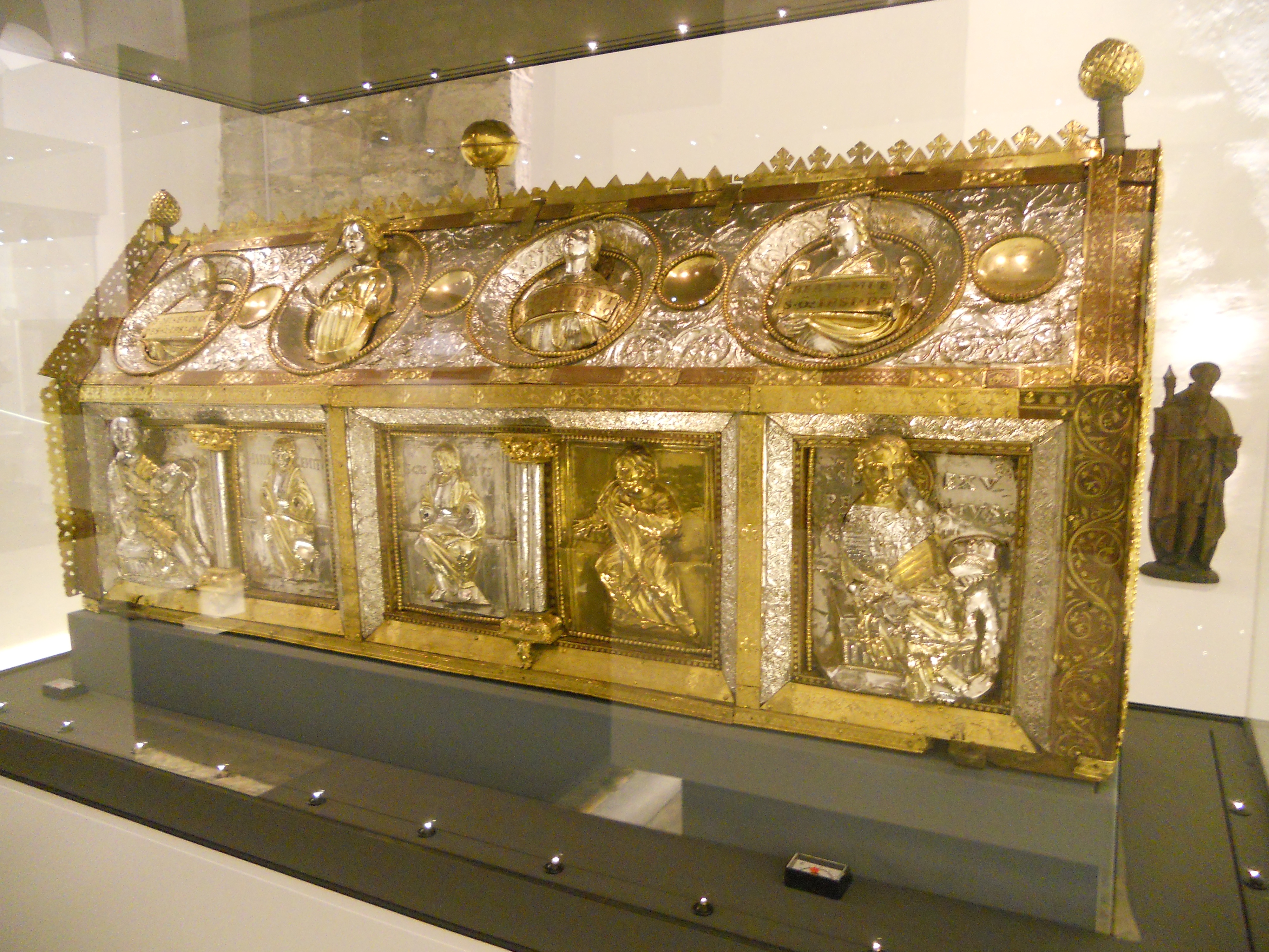 Châsse réalisée vers 1172-1173 et attribué à Godefroy de Huy . Bien classé de la communautés française depuis le 12 février 2010